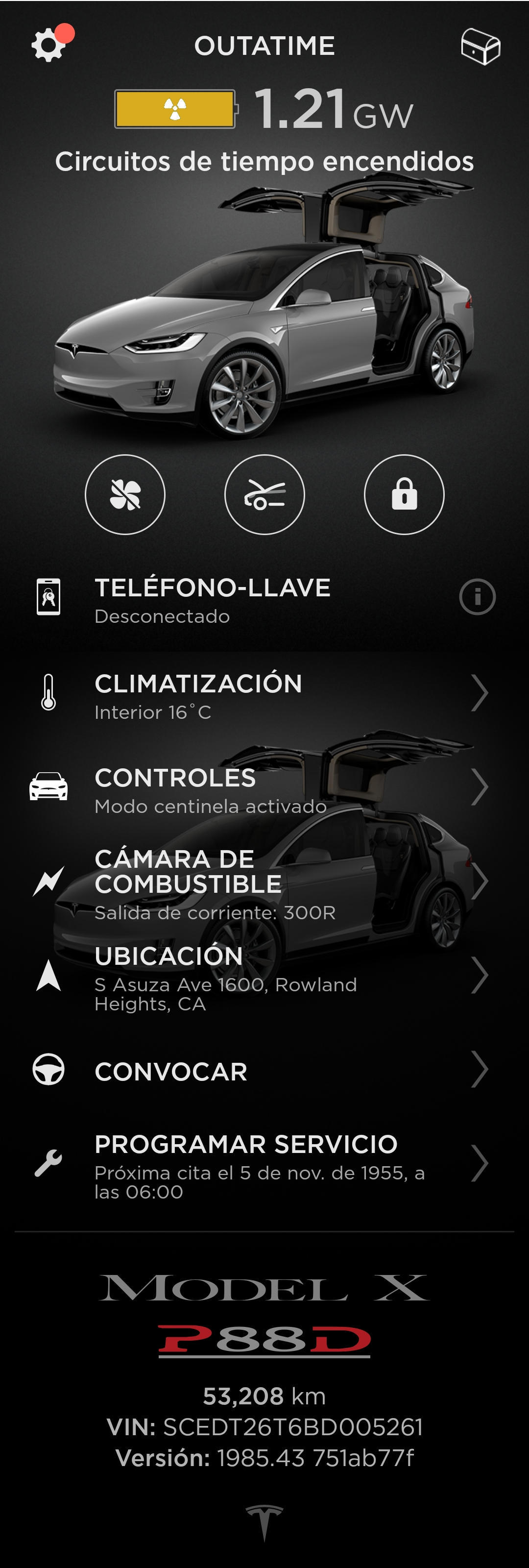 Huevo de Pascua Outatime en la app Tesla. Se accede cuando quedan 121 km de autonomía y se pulsa en el icono de la batería. Cambia varios datos por otros de la película Back To The Future (Regreso al Futuro).